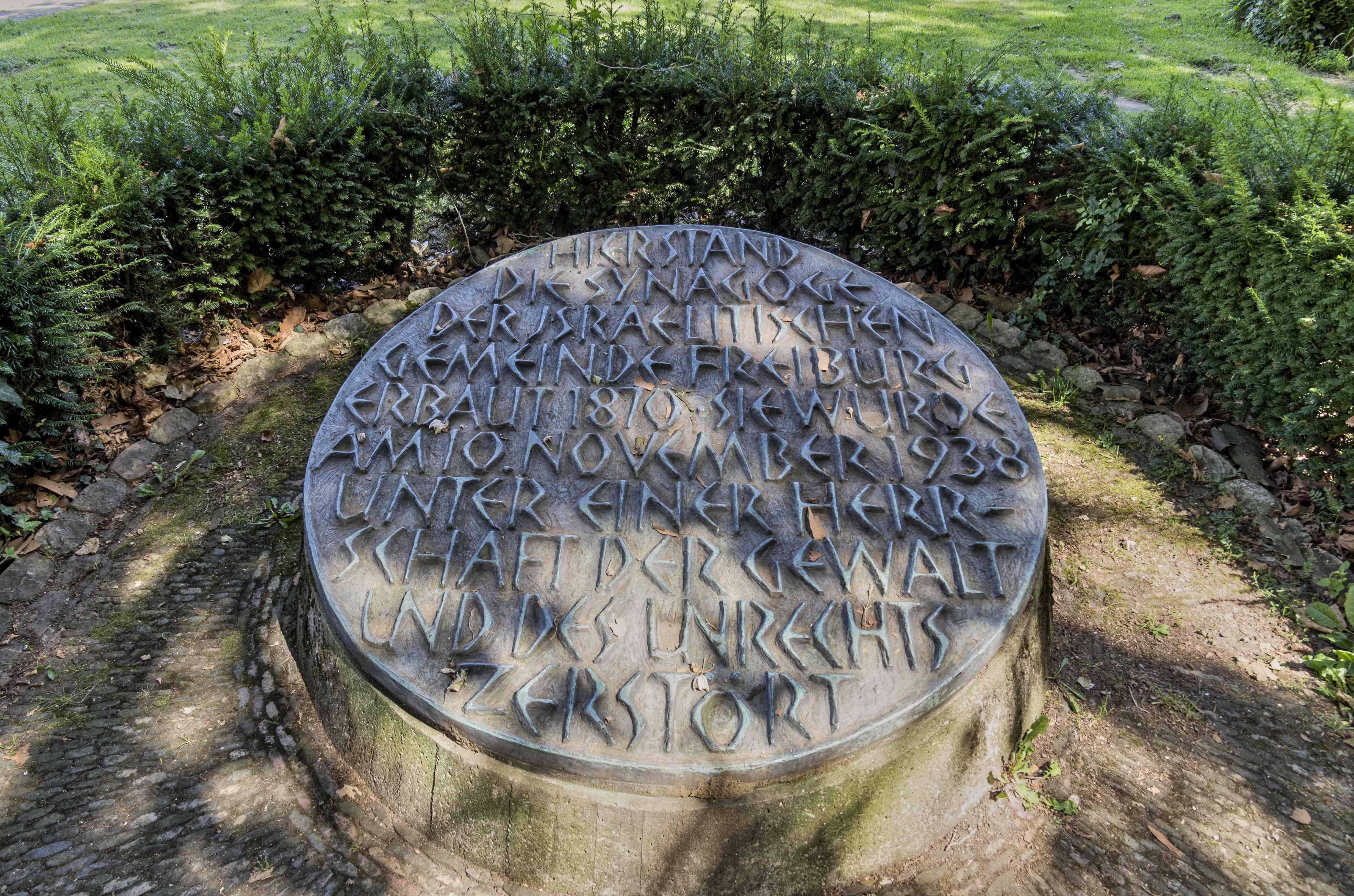 Gebäude und Denkmäler in Freiburg im Breisgau